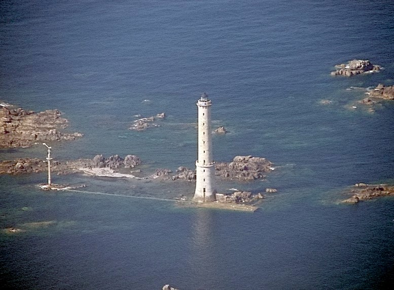 Photographie aérienne du phare Héaux-de-Bréhat / Héaux-de-Bréhat lighthouse (France), airborne photograph